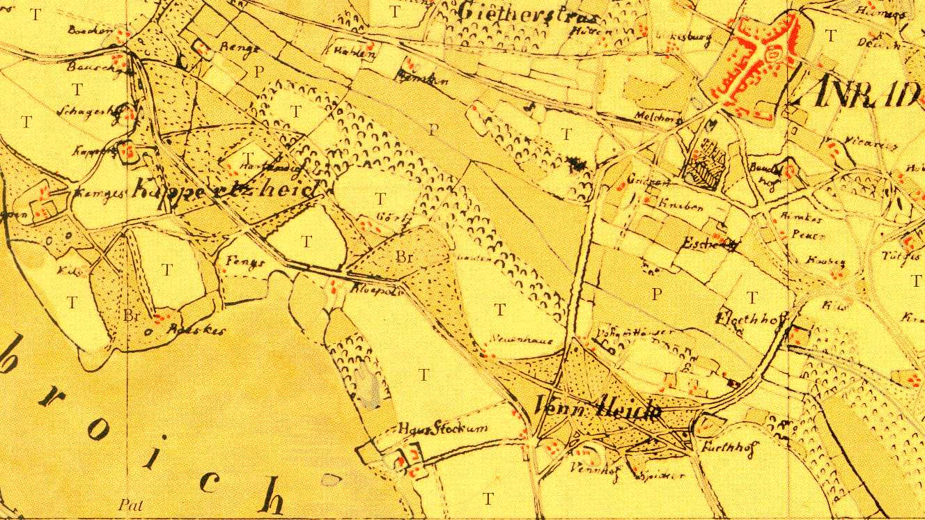 Kartenaufnahme der Rheinlande durch Tranchot und von Müffling, Blatt 42 (Viersen), Ausschnitt mit dem Gebiet des Dorfs Anrath und des Weilers Vennheide.